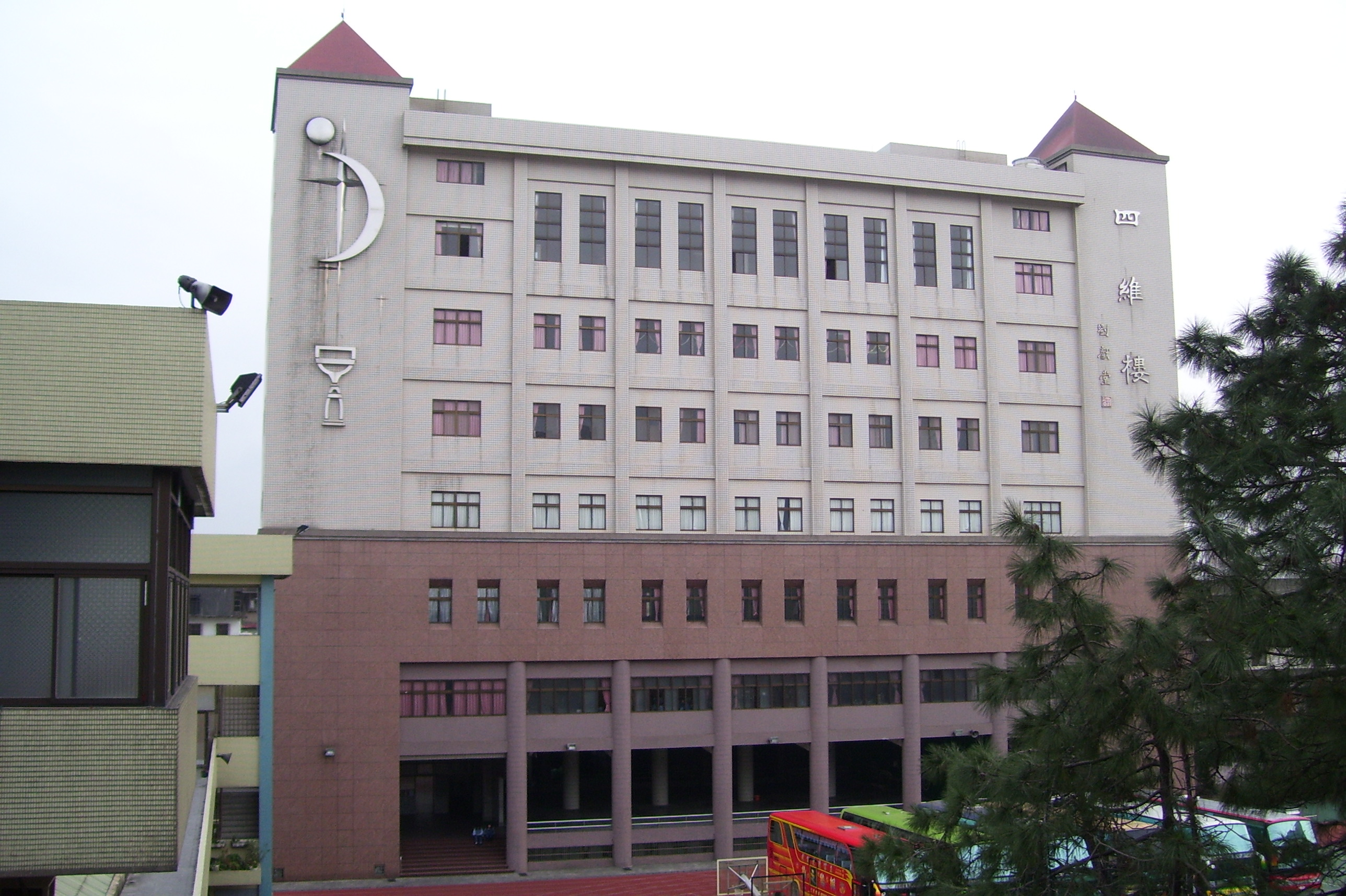 振聲高級中學四維樓。